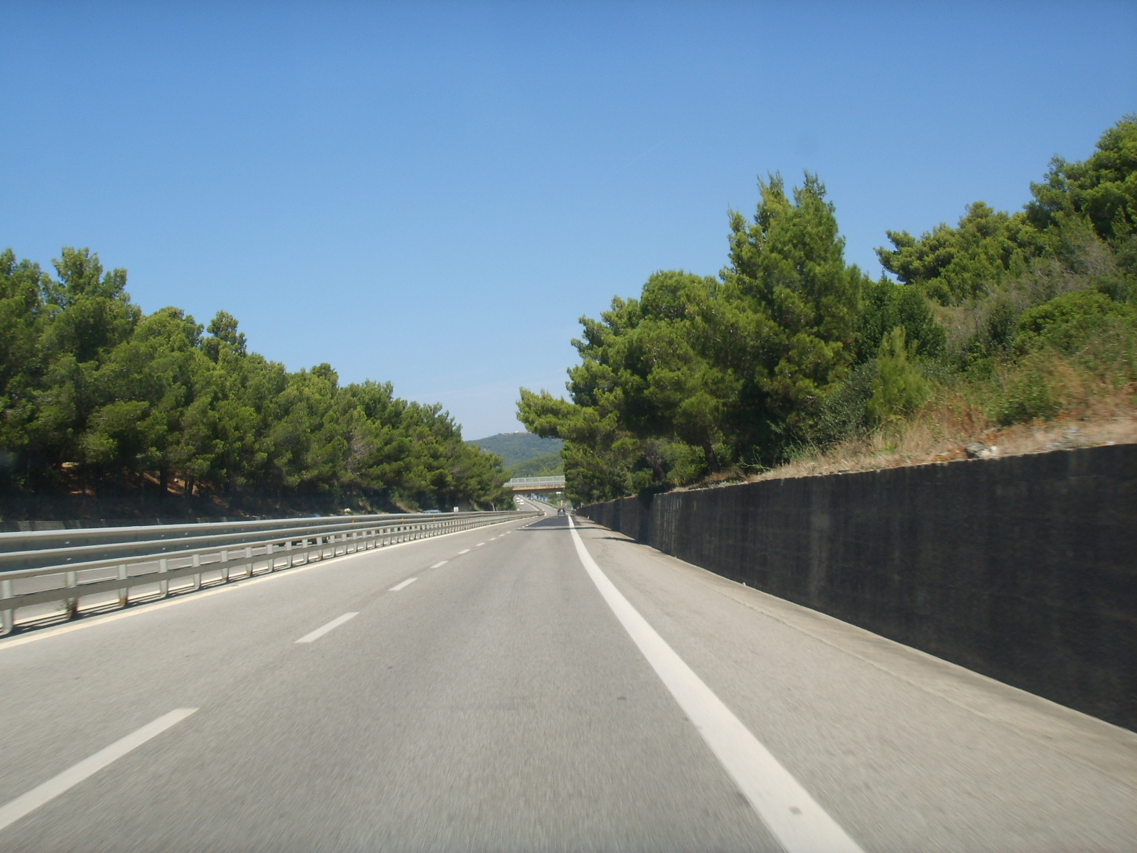 Via aurelia presso livorno